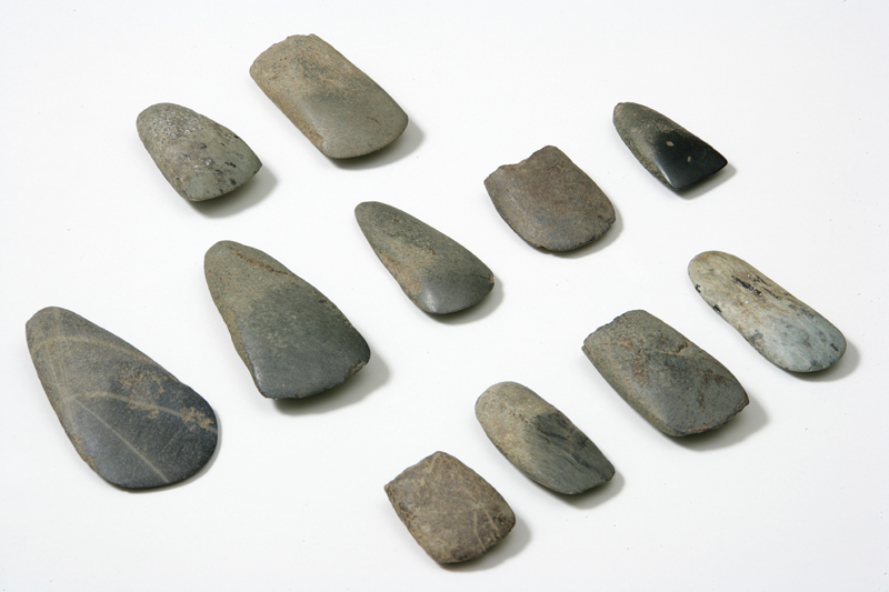 Asce in pietra verde levigata di età neolitica, legate al disboscamento delle aree successivamente adibite a coltivazione.